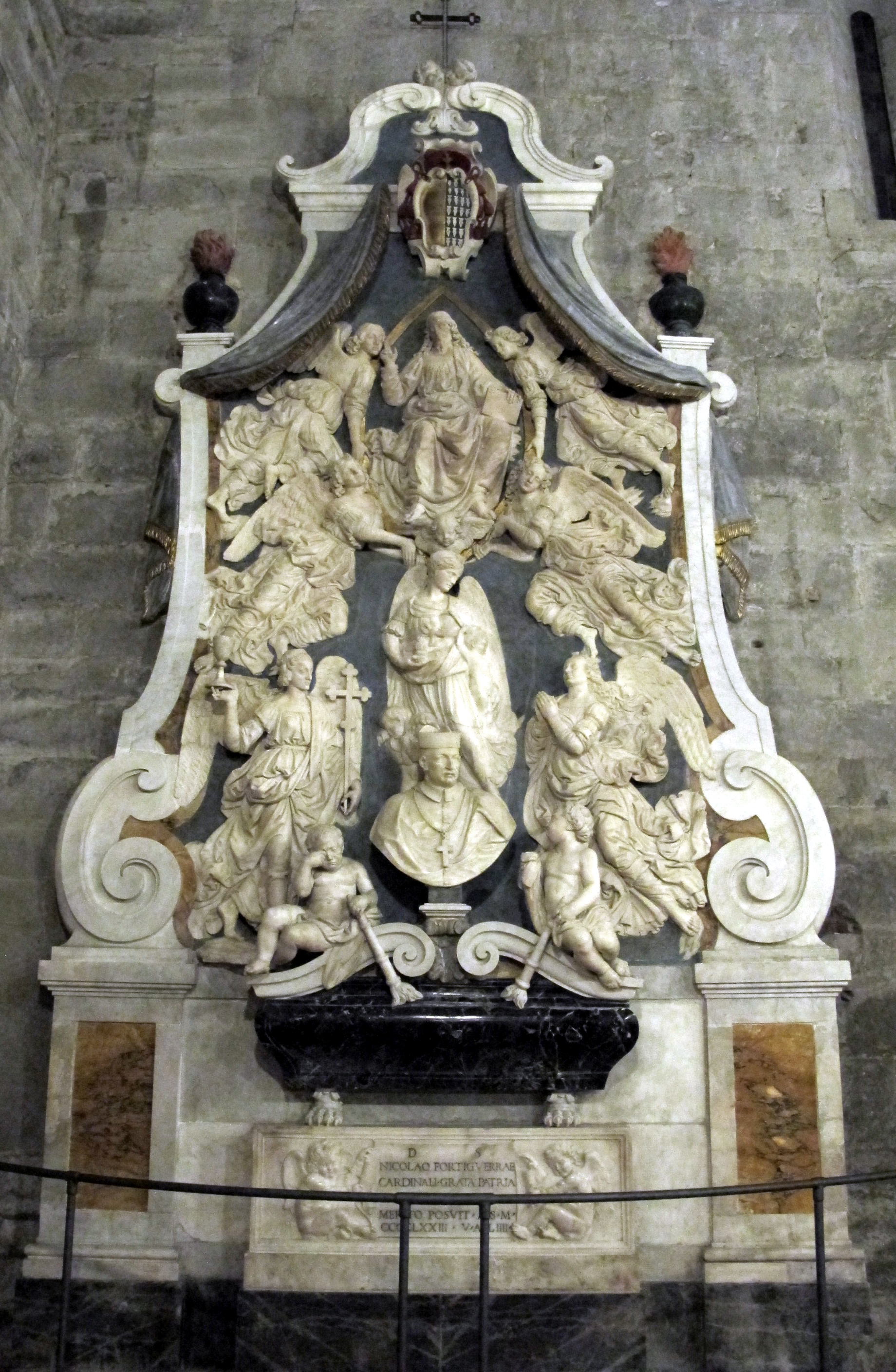 Verrocchio, monumento forteguerri